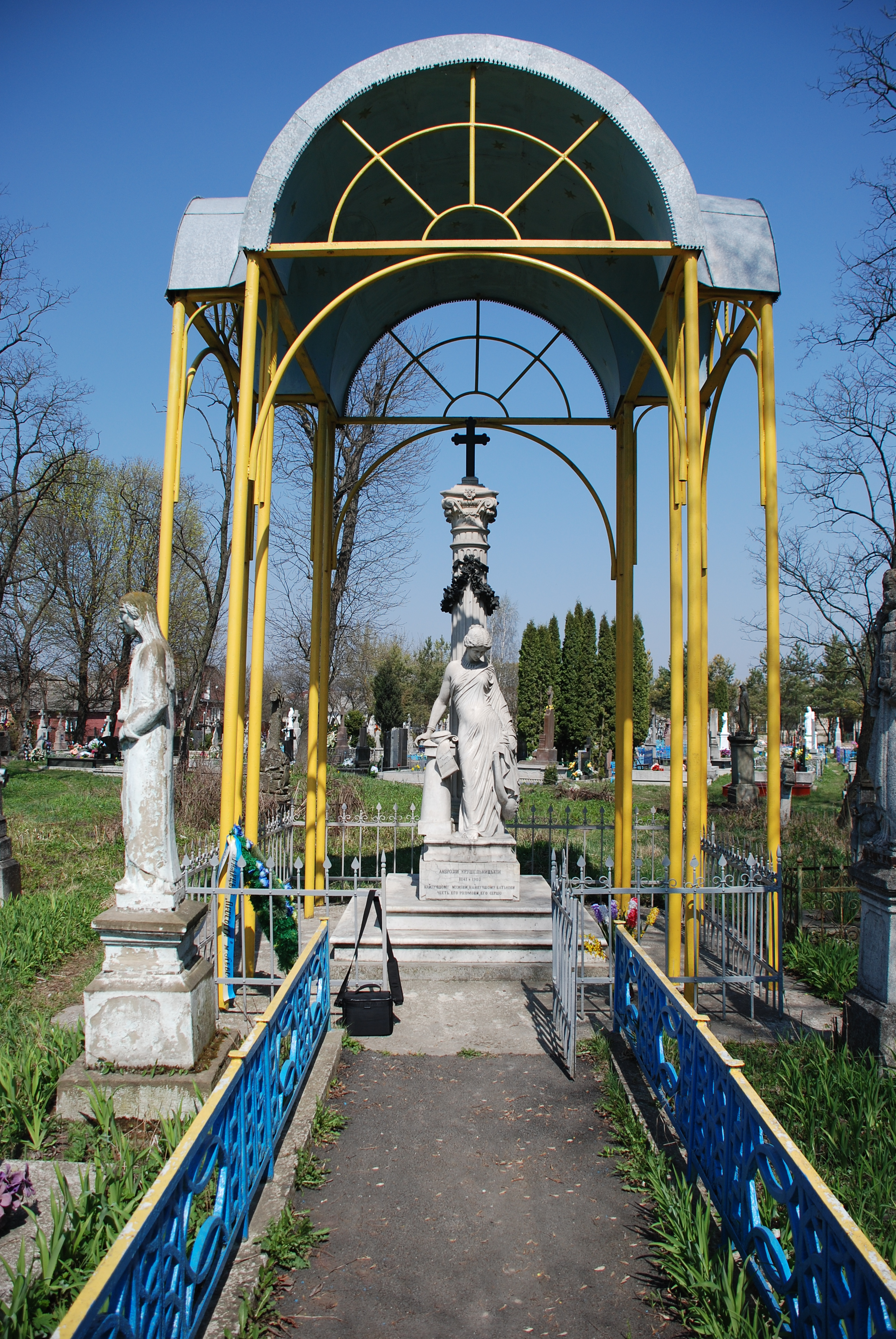 Пам'ятник на могилі о. Амвросія Крушельницького. Статуя виготовлена на замовлення Соломії Крушельницької і встановлена на могилі її батька